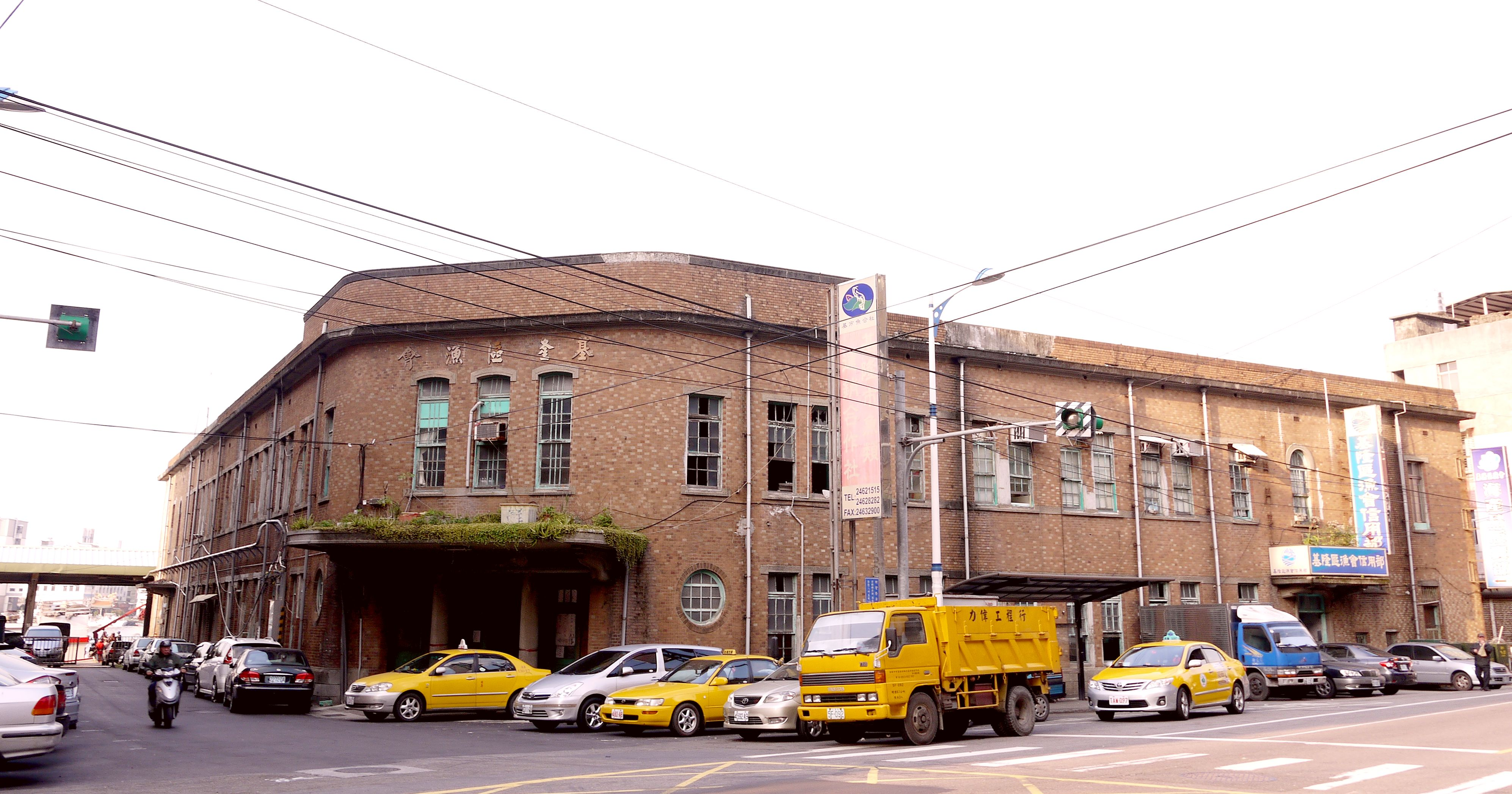 漁會正濱大樓